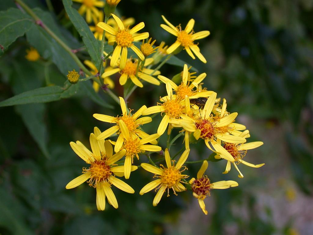 2005/11/26 和歌山県田辺市：Tanabe City. Wakayama Pref. Japan